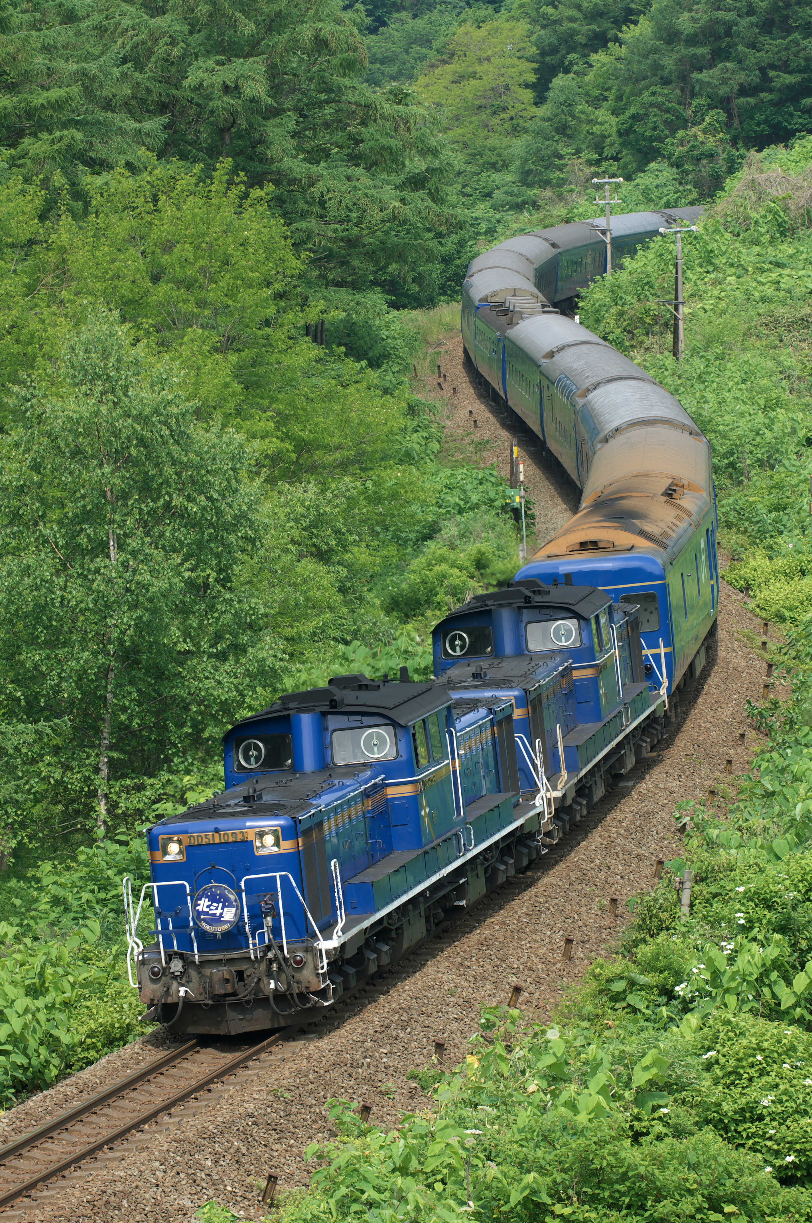 DD51牽引による寝台特急「北斗星」 室蘭本線・北入江信号所〜有珠